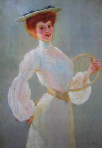 Joueuse de tennis.title QS:P1476,fr:"Joueuse de tennis." label QS:Lfr,"Joueuse de tennis."